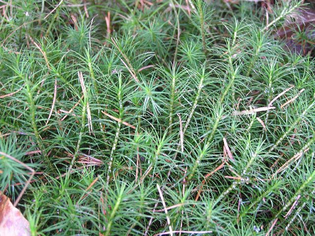 Polytrichum commune bei Schladern an der Sieg.